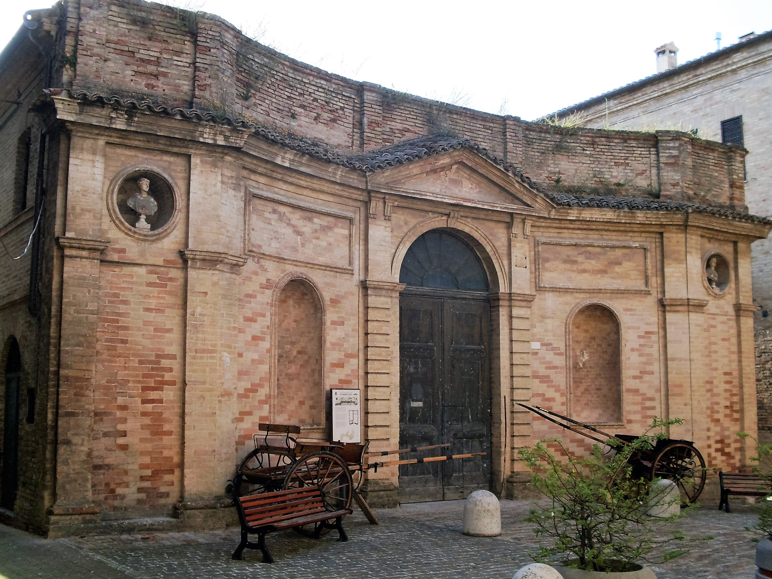 Recanati vecchia scuderia